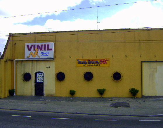 Casa da minha prima!